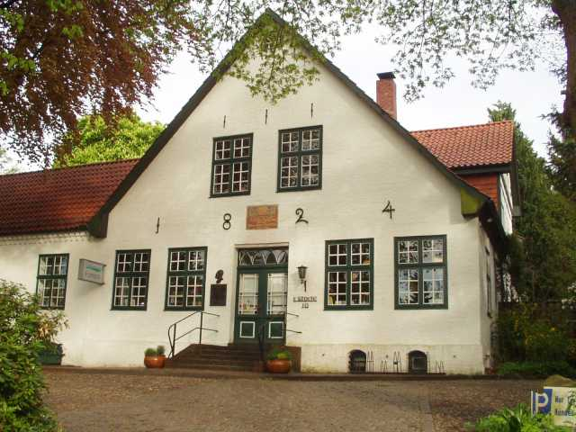 Kaufhaus Stolte in Worpswede.